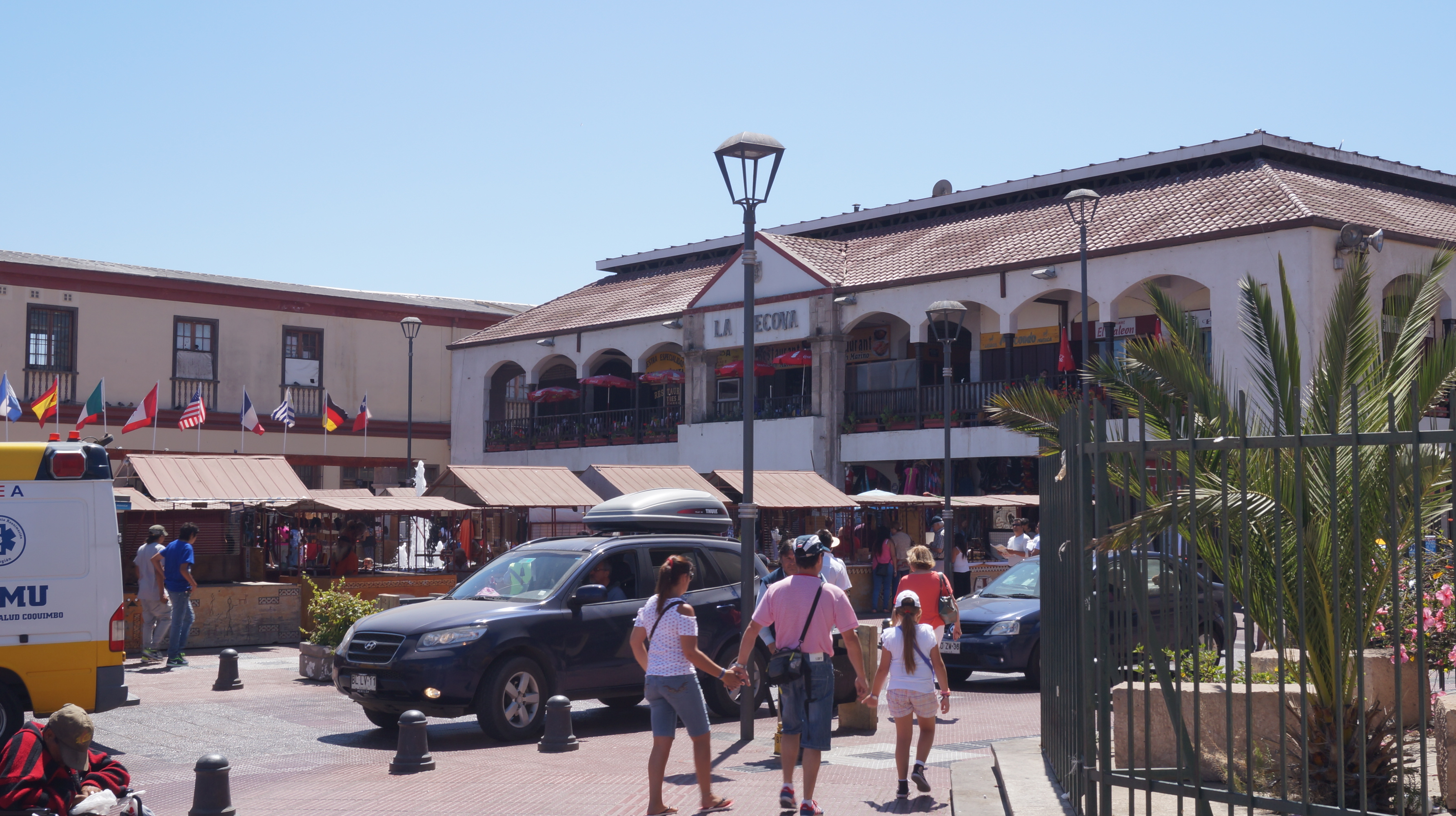 Recova